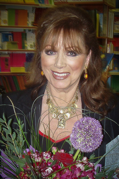 Писательница Джеки Коллинз